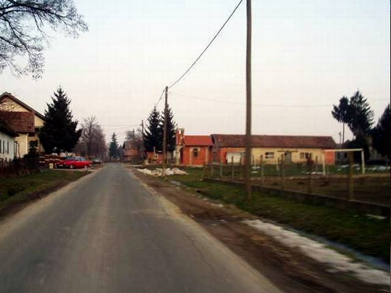 Praščevac - Main Road